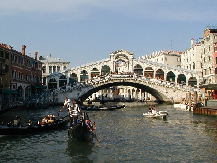 Il Ponte di Rialto. La foto è stata scattata a bordo del vaporetto sul Canal Grande a Venezia il 20 agosto 2001.